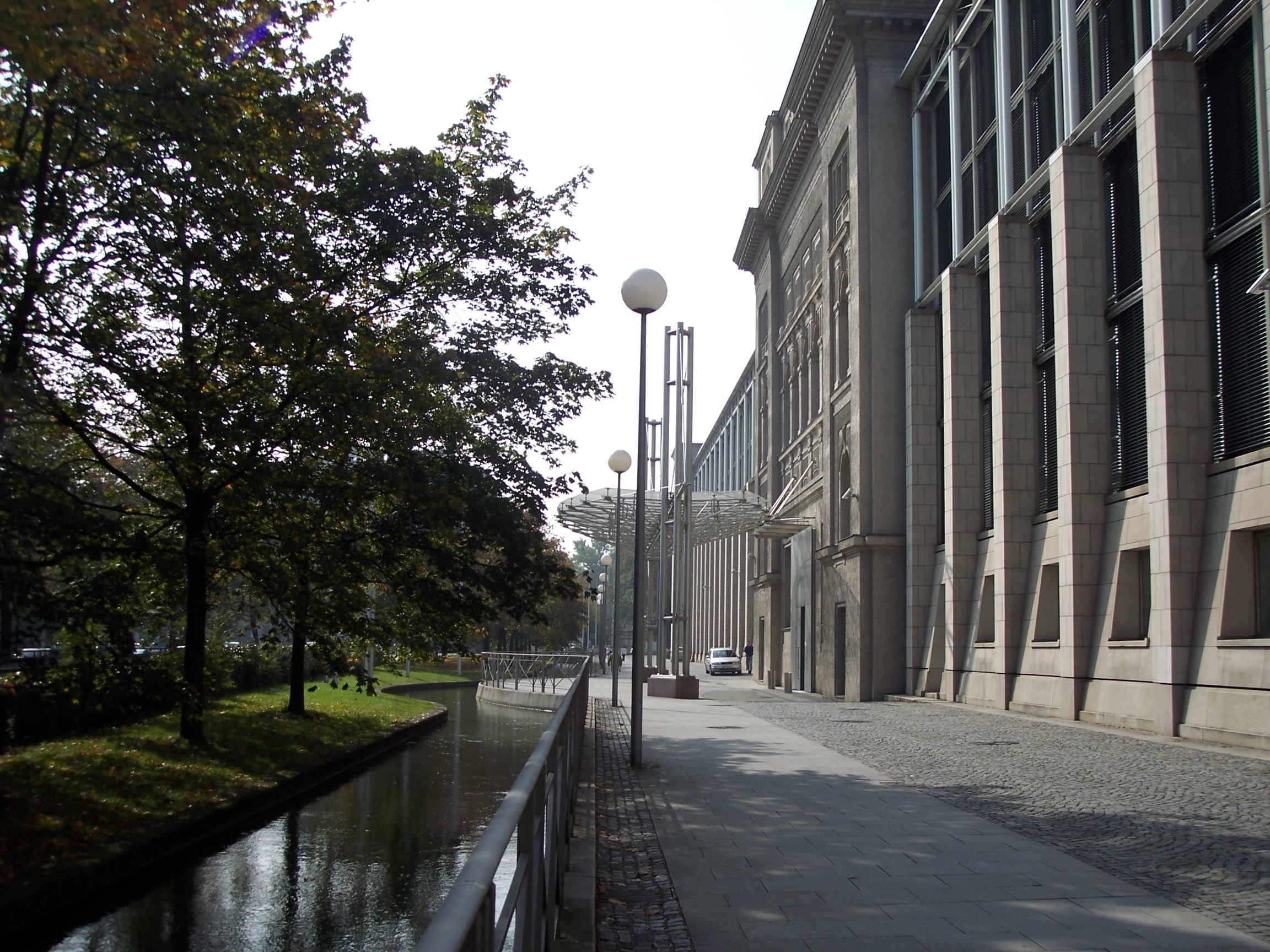 Köglmühlbach in Munich, Germany east of Bayerische Staatskanzlei